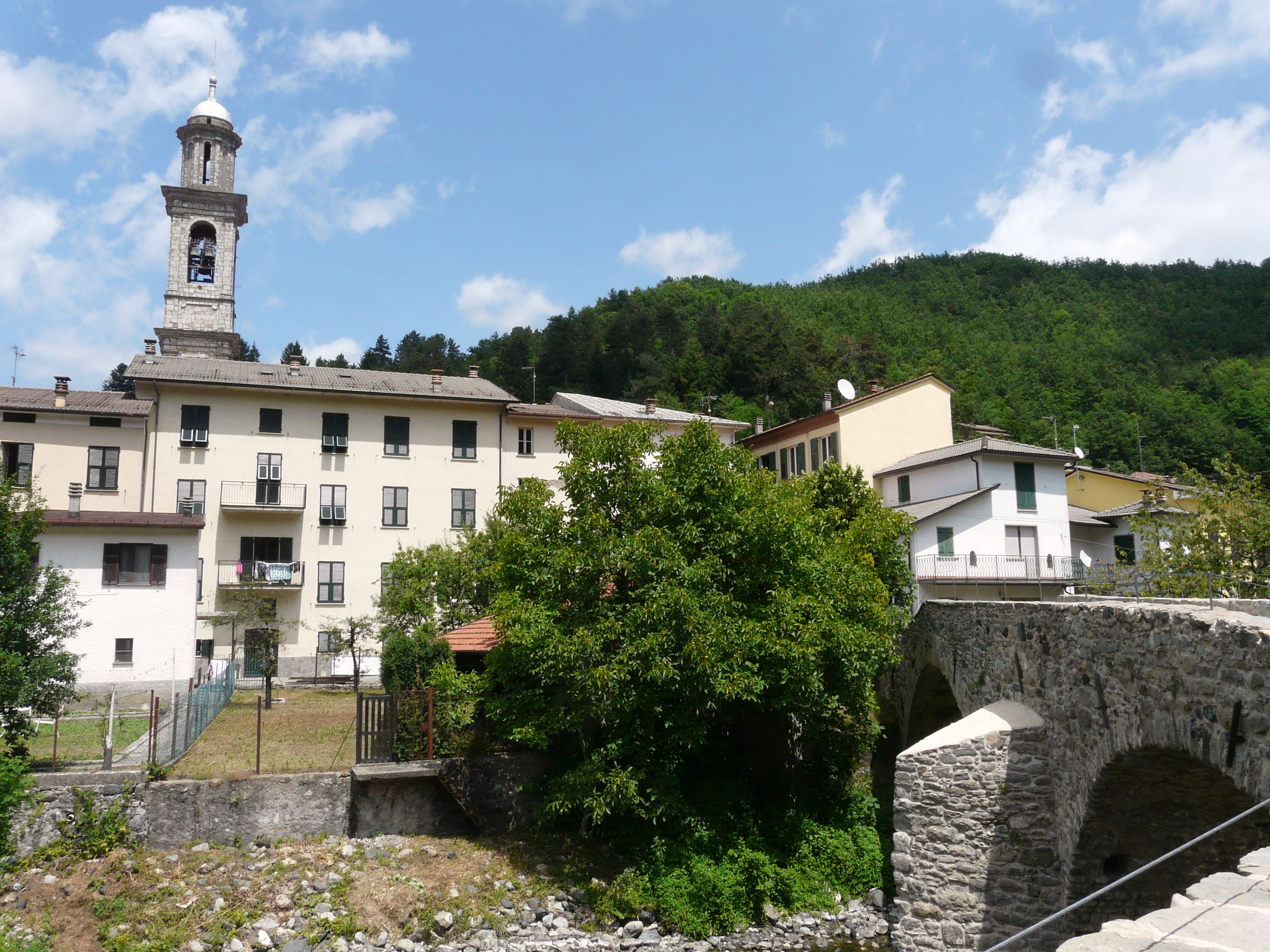 Il ponte dei Priori e panorama di Santa Maria del Taro, Tornolo, Emilia-Romagna, Italia